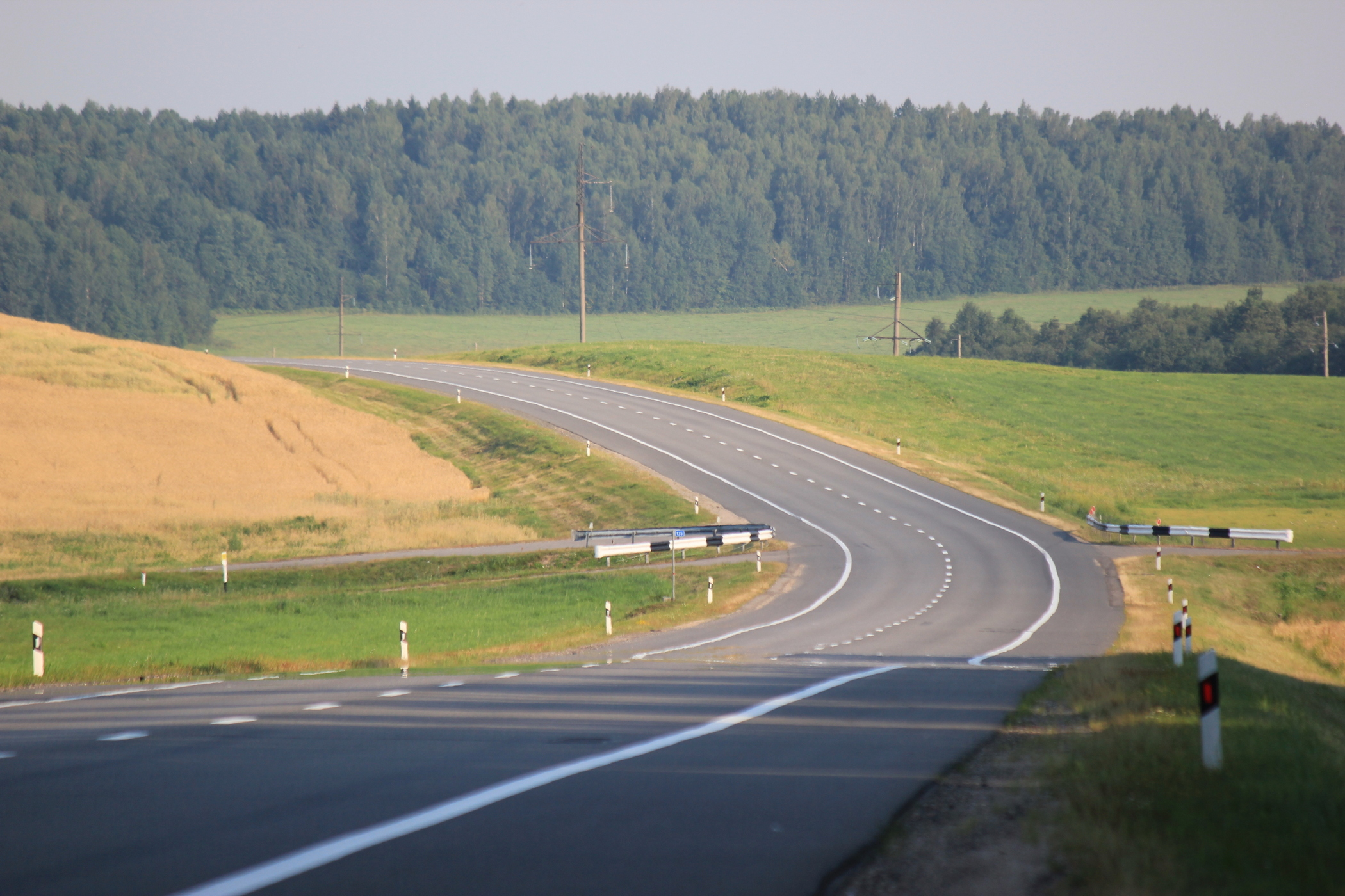 Fernstraße M7 von der litauischen Grenze nach Aschmjany, Belarus.